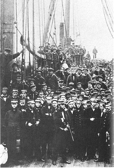 Konteradmiral Wilhelm von Tegetthoff inmitten seiner Mannschaft auf seinem Flaggschiff "Schwarzenberg" nach dem Seegefecht vor Helgoland. Aufnahme in Cuxhaven am 6. Juni 1864.